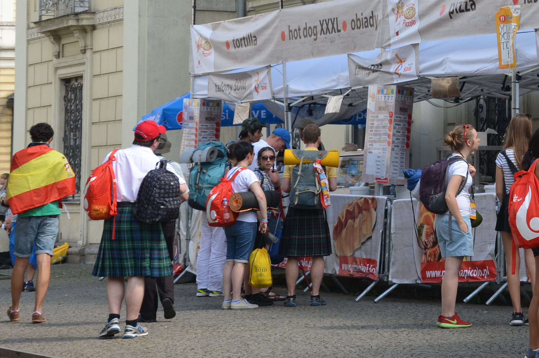 Schnäppchen-Essen zum Weltjugendtag 2016 in Krakau